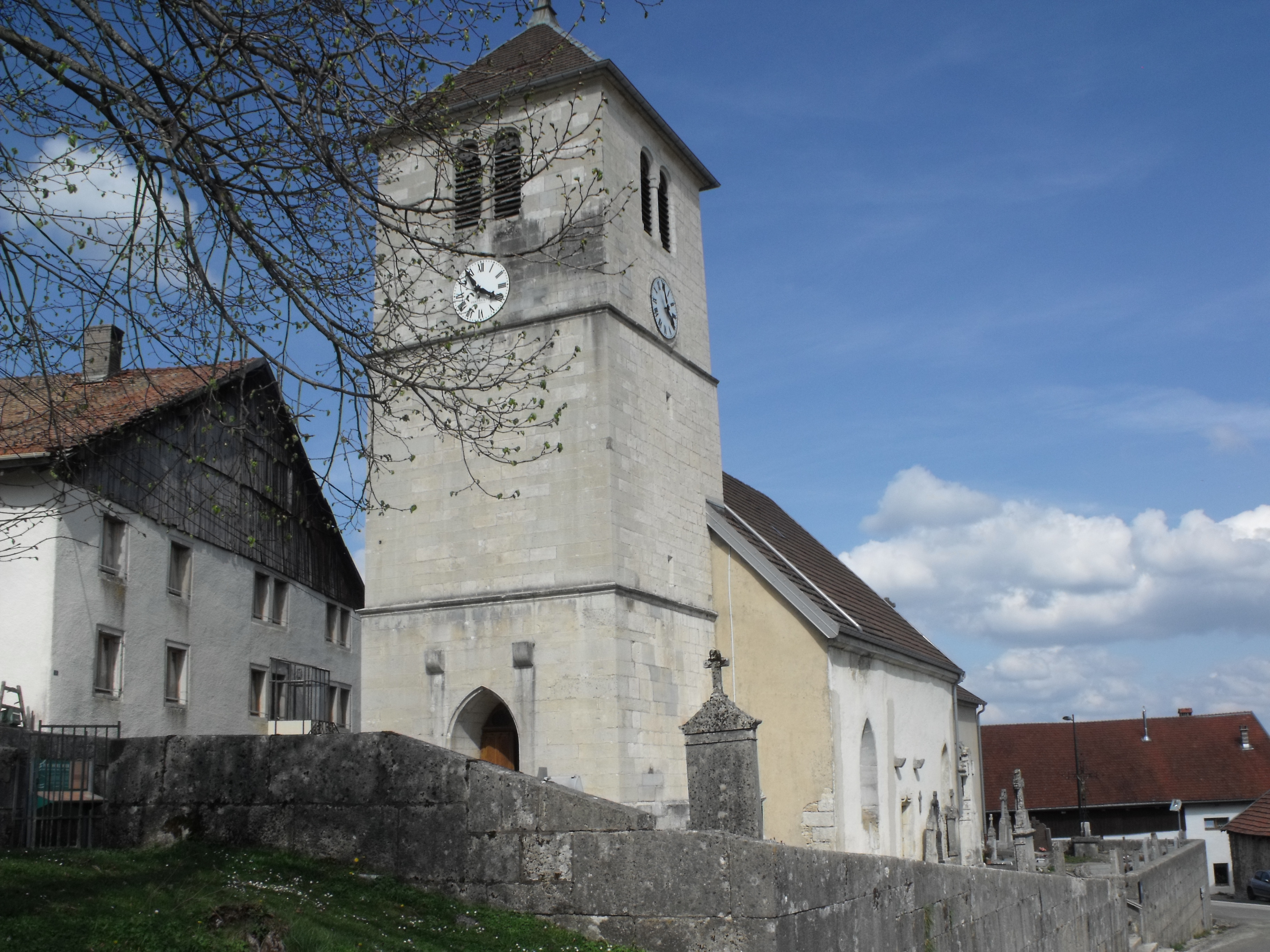 Église Saint-Antoine de Cernay-l'Église, Doubs, France